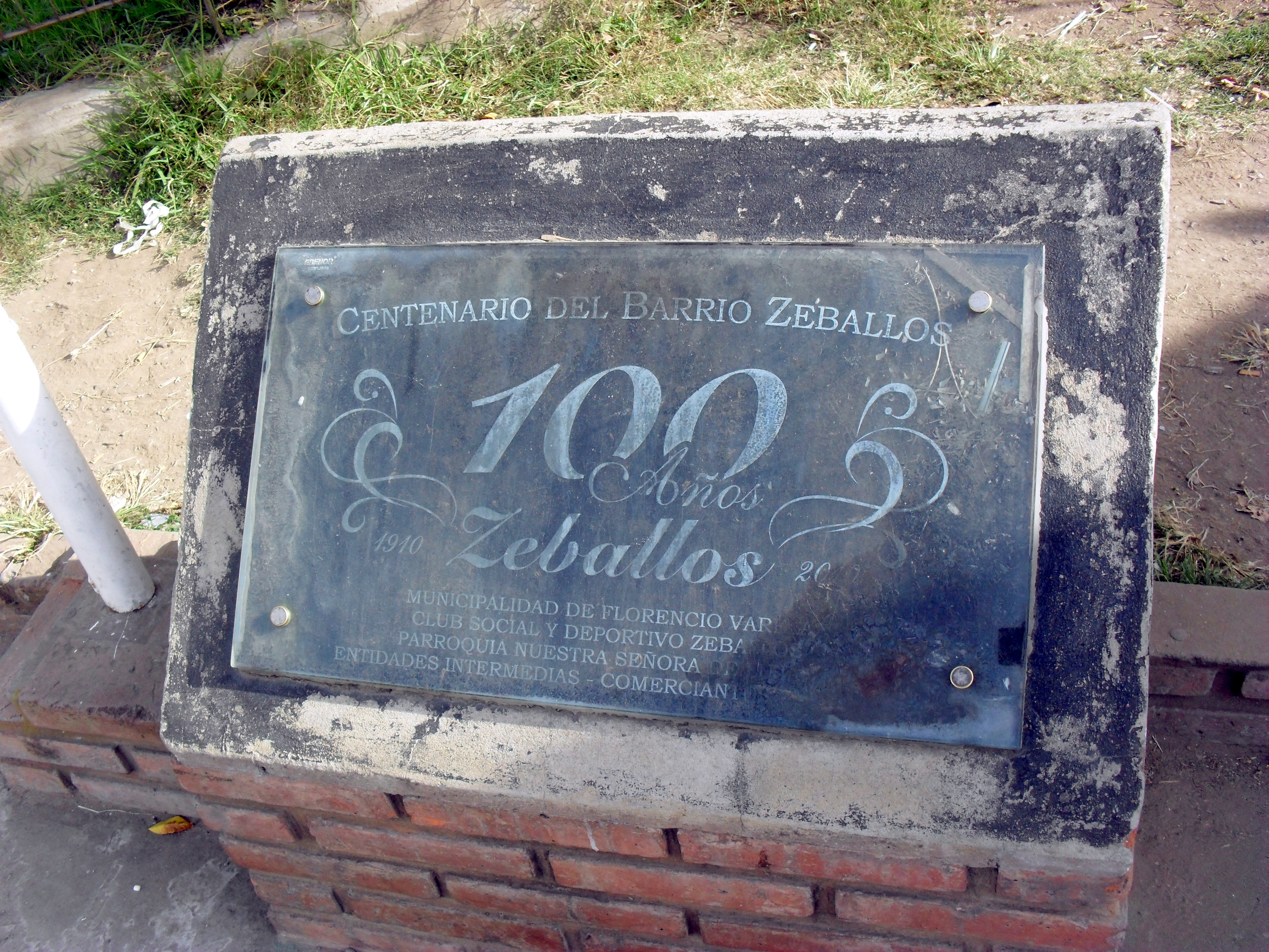 Estación Zeballos Placa centenario